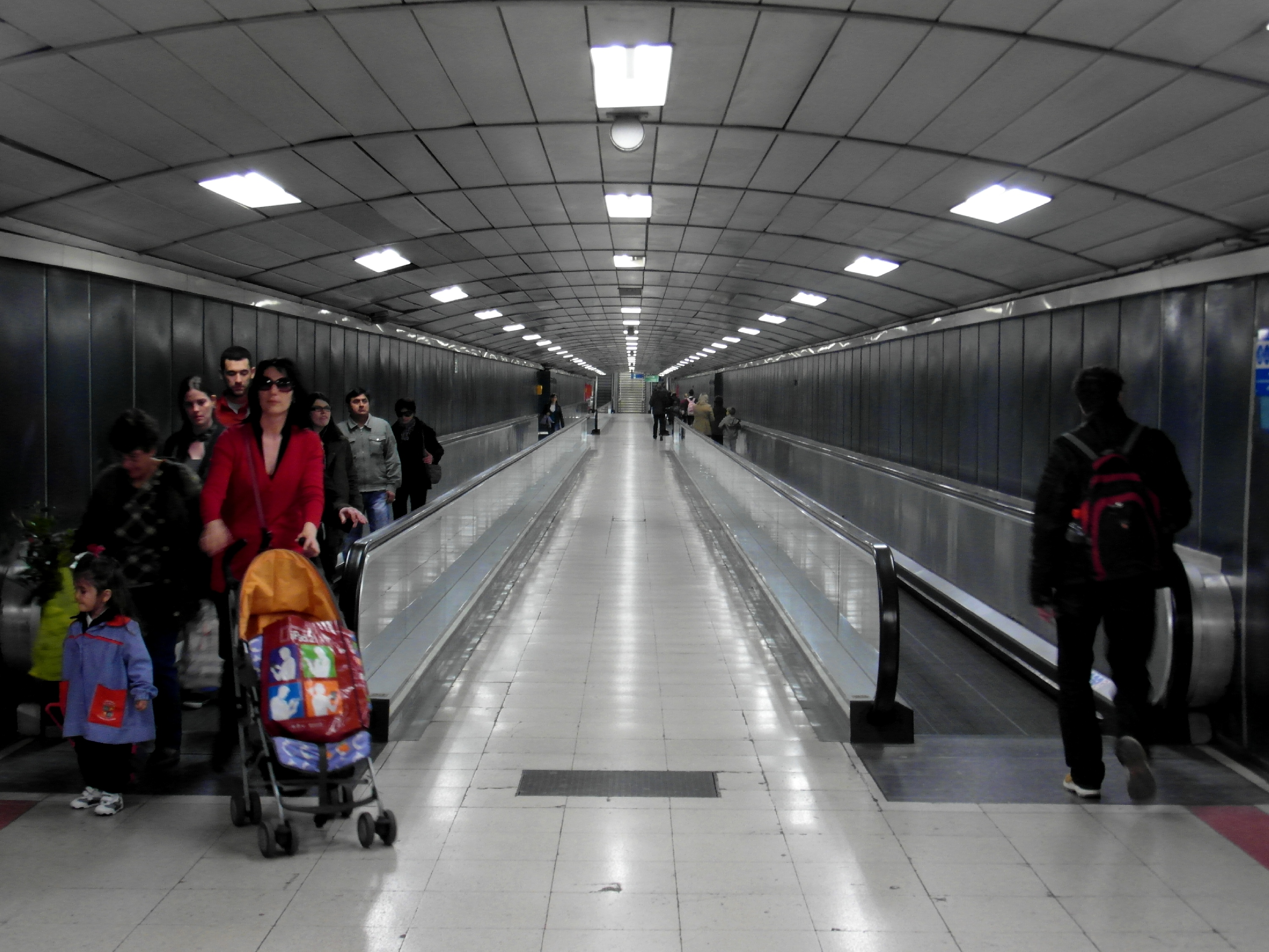 Madrid - Metro - Estación de Núñez de Balboa